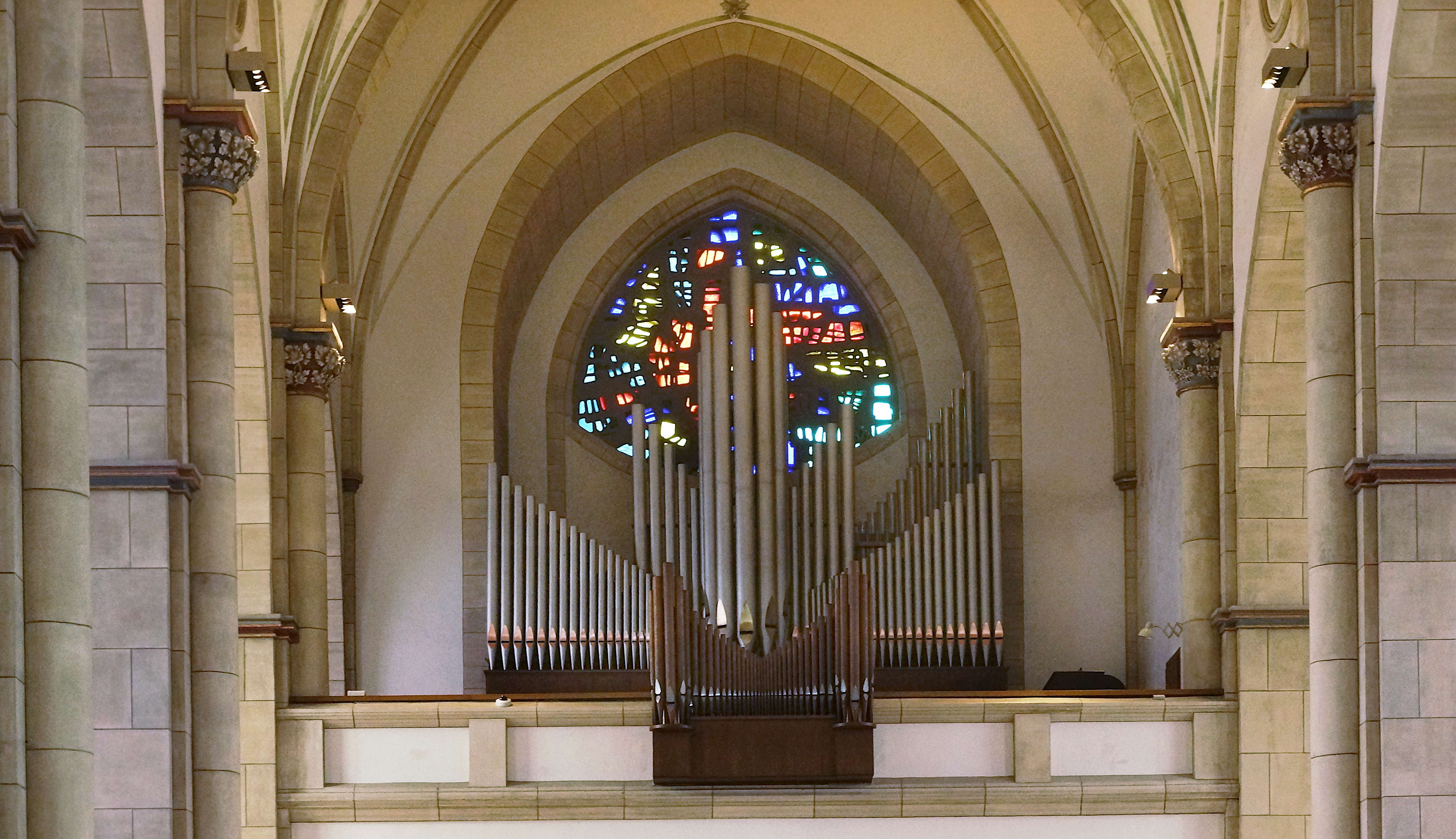 Dortmund Liebfrauenkirche Innenraum mit Blick zur Orgel